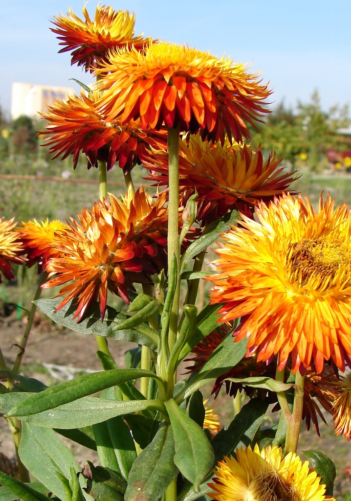 Xerochrysum bracteatum (kocanki ogrodowe)